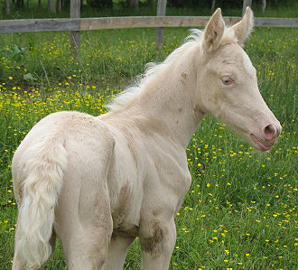 Une pouliche de robe crème